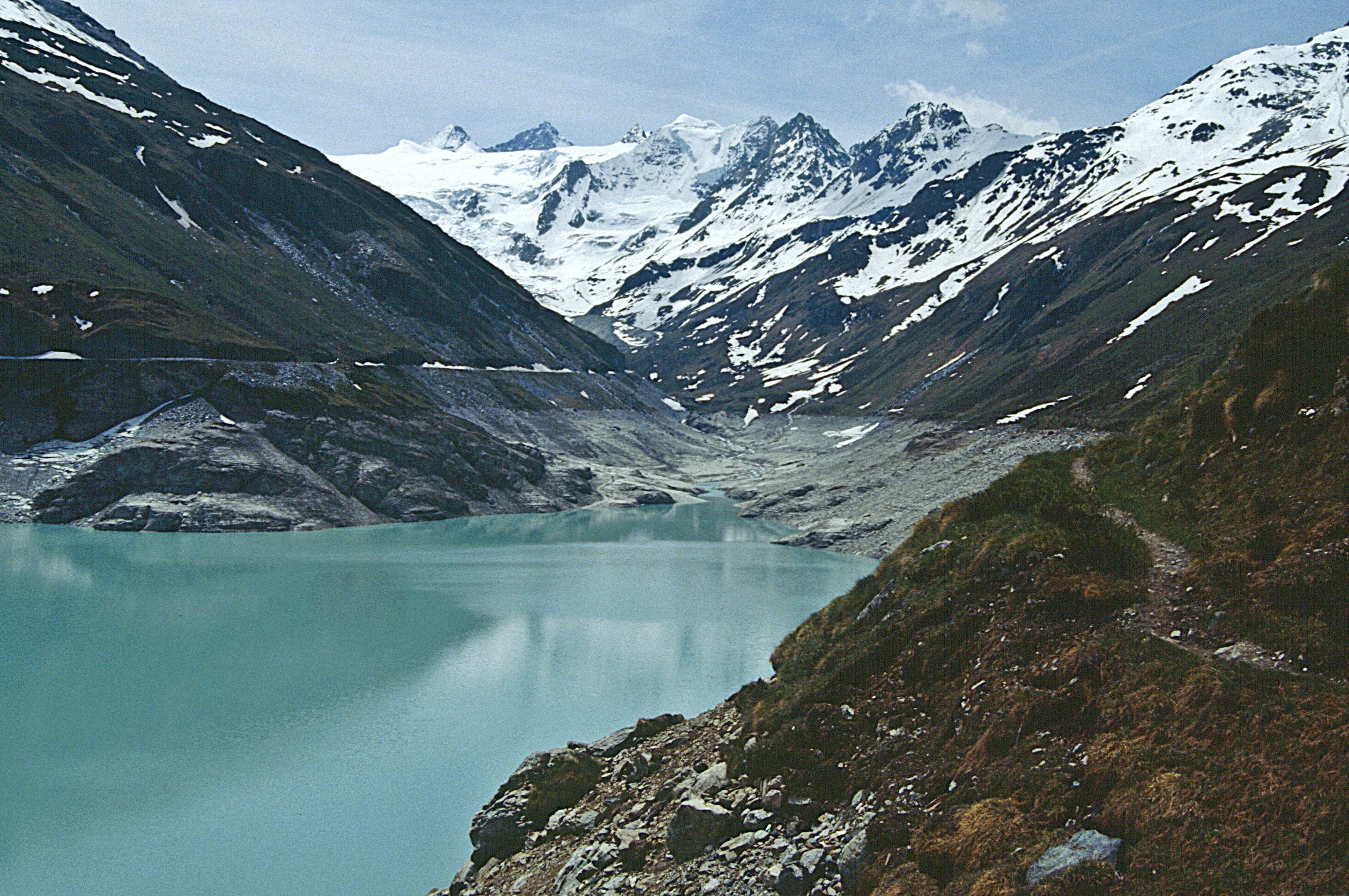 Val d'Anniviers: Lac de Moiry